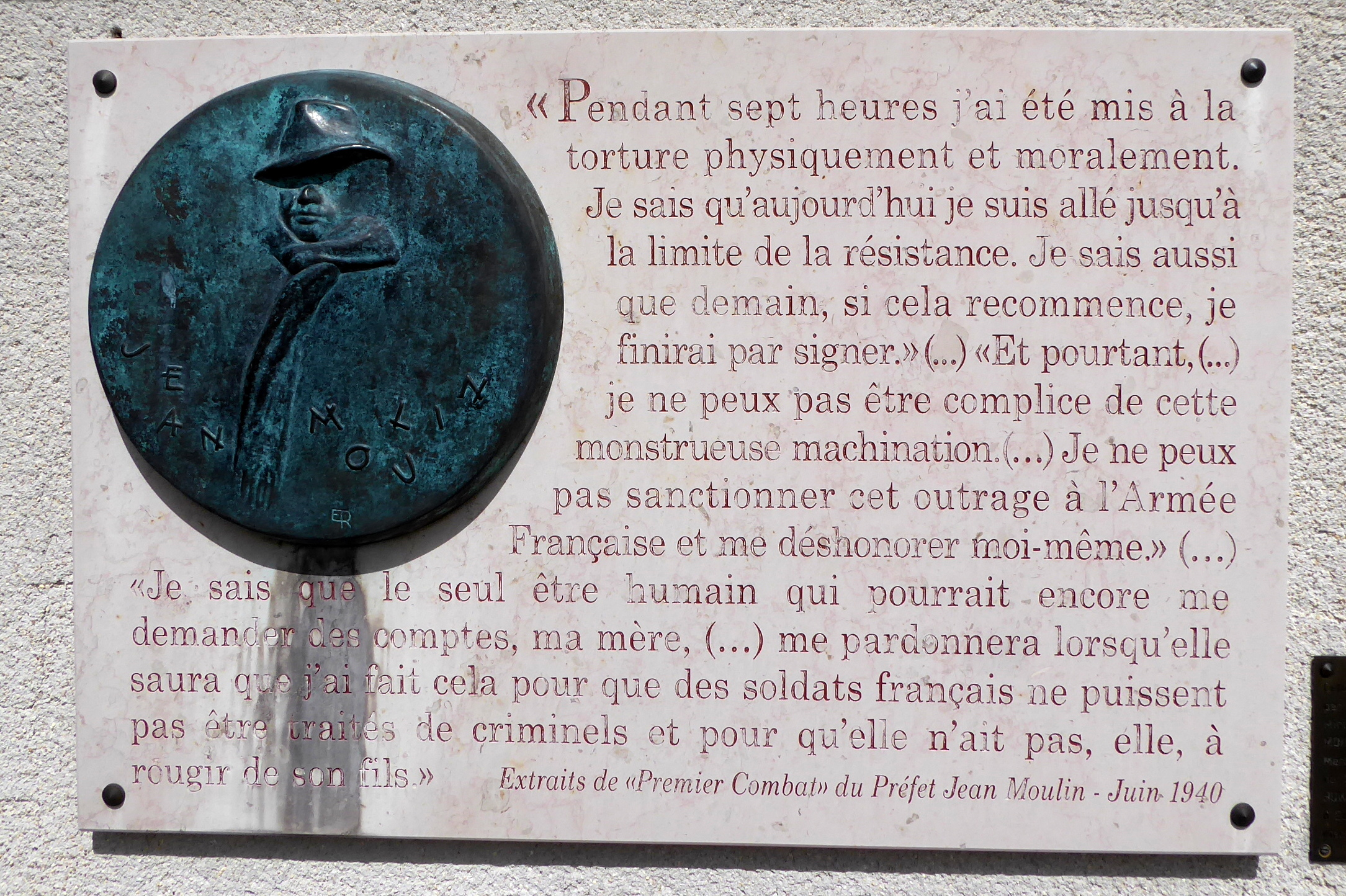 Plaque citant des extraits du livre de Jean Moulin "Premier combat", La Taye, Saint-Georges-sur-Eure, Eure-et-Loir (France).